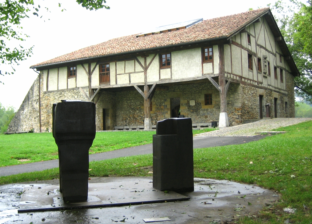 House in the Chillida-Leku, Hernani (Gipuzkoa). Caserío en el Chillida-Leku, Hernani (Gipuzkoa). Esta foto participó en el juego En un Lugar de Flickr .